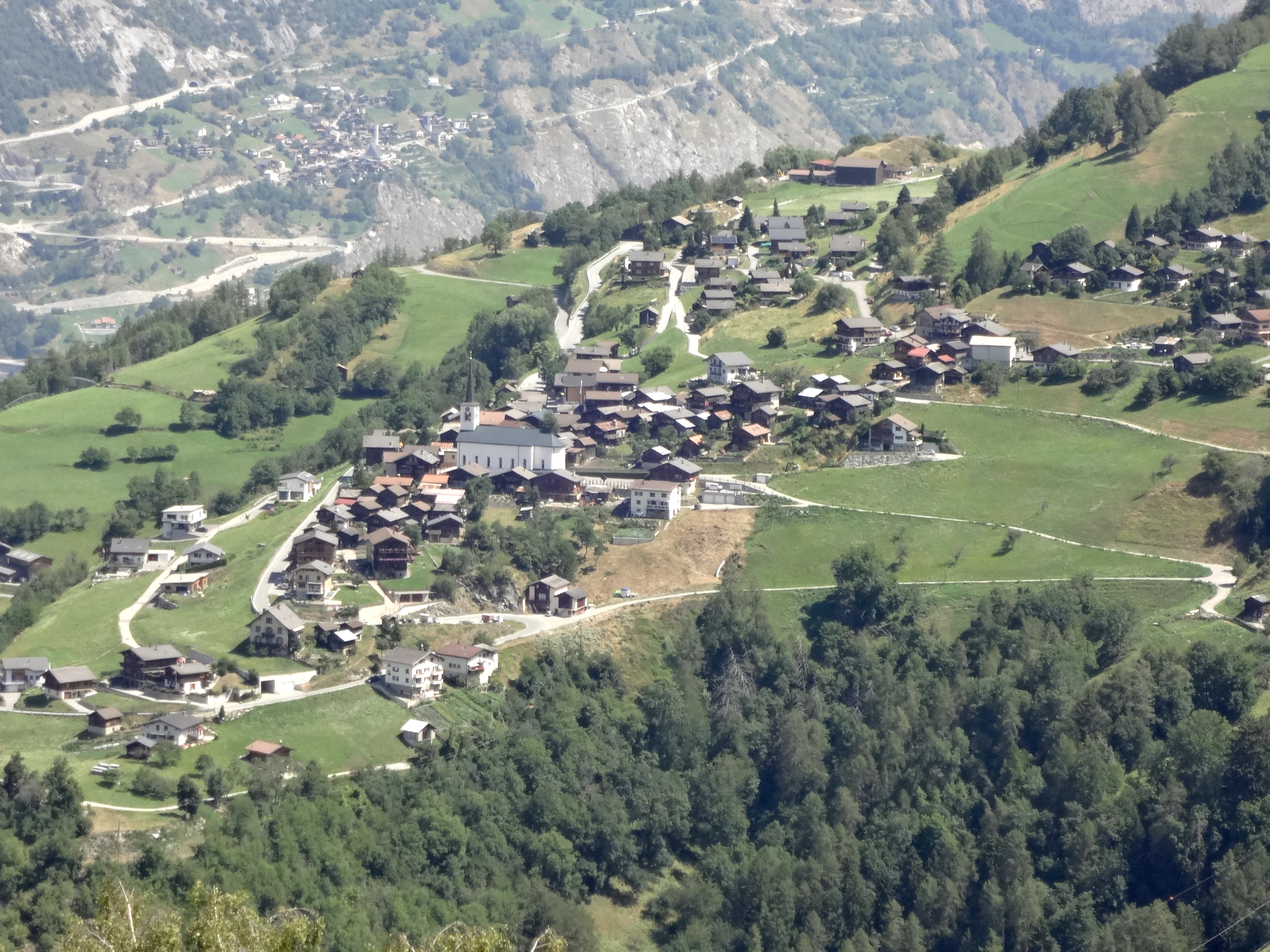 Ergisch vu depuis Oberems.